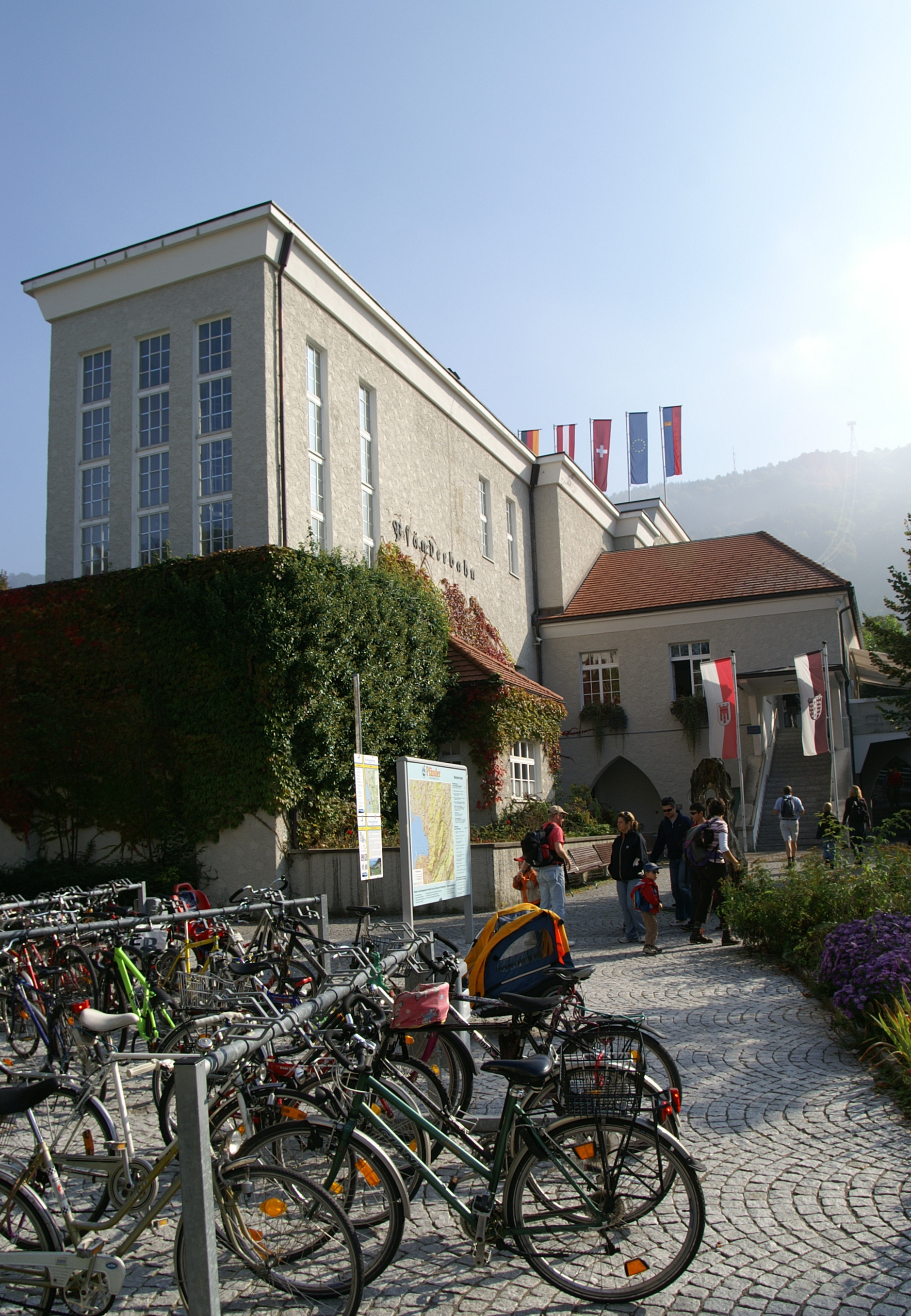 Talstation der Pfänderbahn in Bregenz. Architekt: Willibald Braun Baujahr 1926